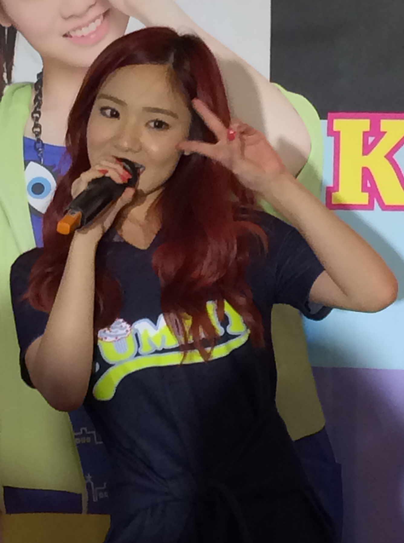 廣三崇光Dailo代言見面會